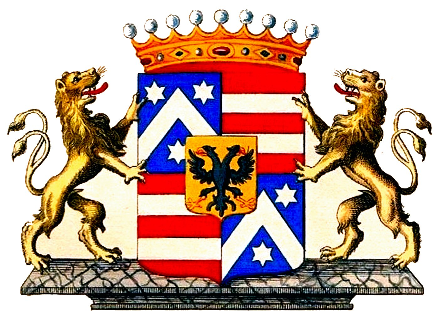 Wappen der Grafen von Dernath, aus Tyroff: Wappenbuch des österreichischen Monarchie, koloriert